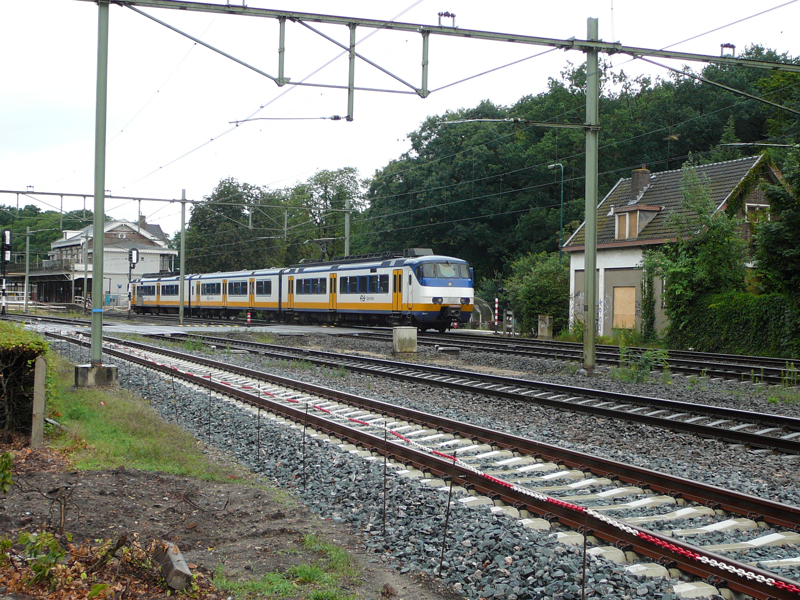 2944 Baarn - Utrecht Centraal, Baarn, 20.07.2008